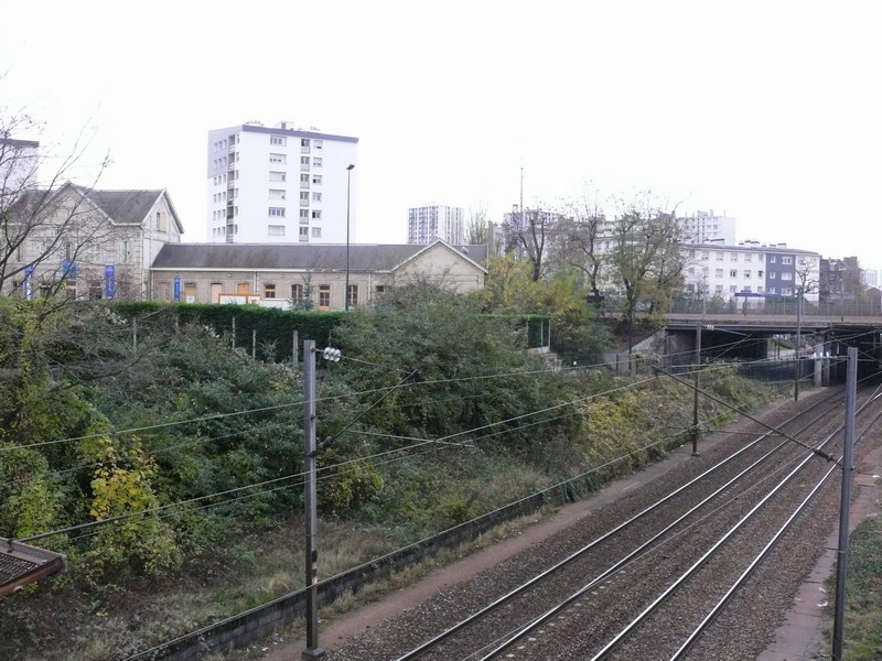 La gare d'Épinay-Villetaneuse Au premier plan, les voies de la Grande Ceinture à la hauteur des quais de l'ancienne gare d'Épinay GC, au second, le pont-rail et la gare du Transilien d'Épinay-Villetaneuse